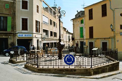 Brunnenplatz in Artà Beschreibung: Brunnenplatz in Artà Quelle: fotografiert am 24. April 2004 Fotograf: Martin Sell Lizenzstatus: GNU FDL